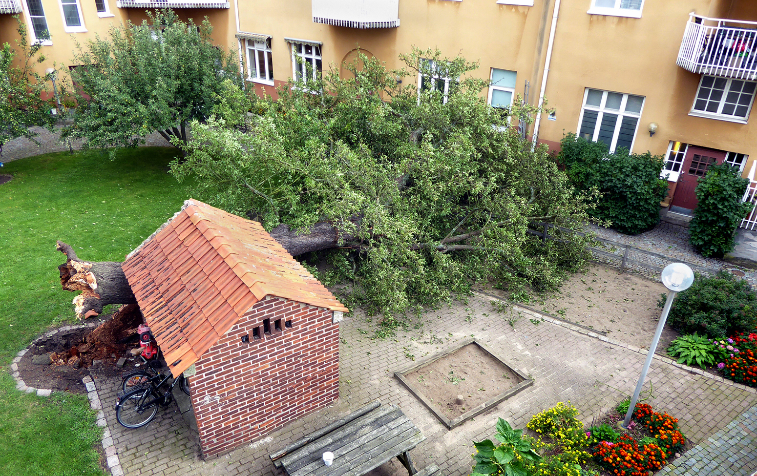 Päronträd kan bli gamla. Ett 104 år gammalt Päronträd föll den 4 aug 2017 till marken på en bakgård i centrala Ystad, ingen människa kom till skada.